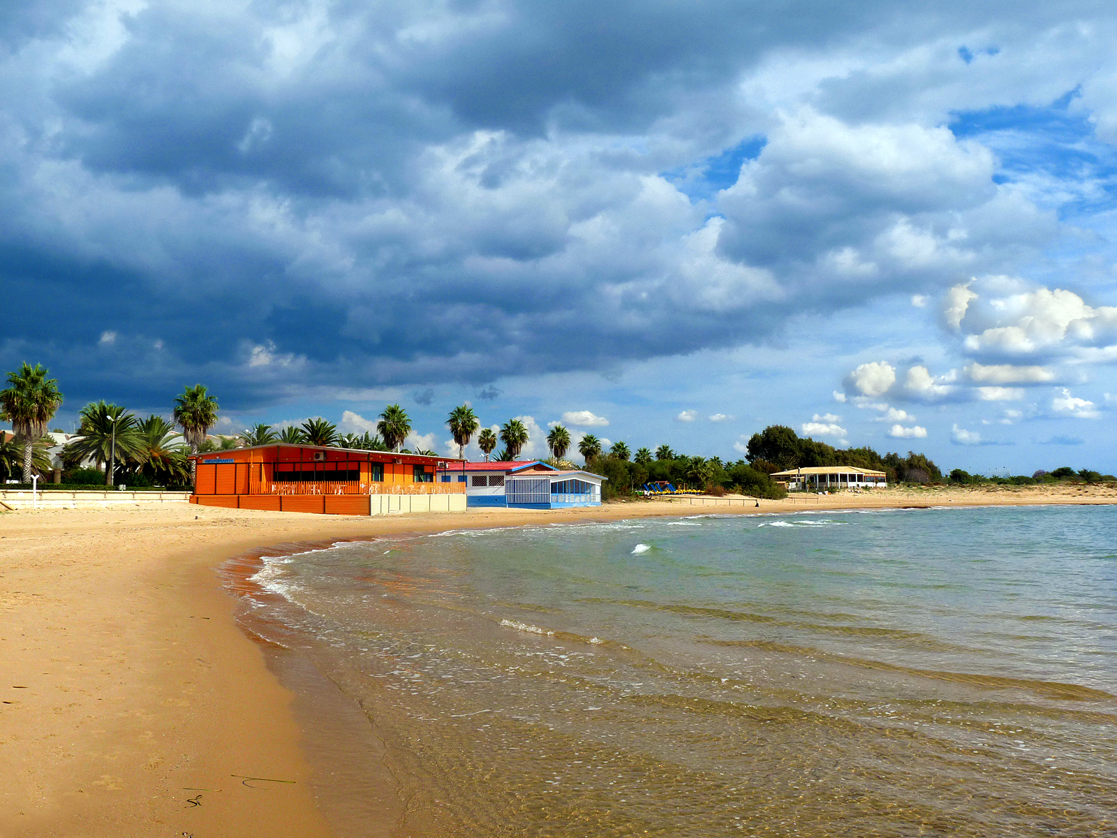 Foto scattata da Giorgio Leggio - Baia, Marina di Ragusa